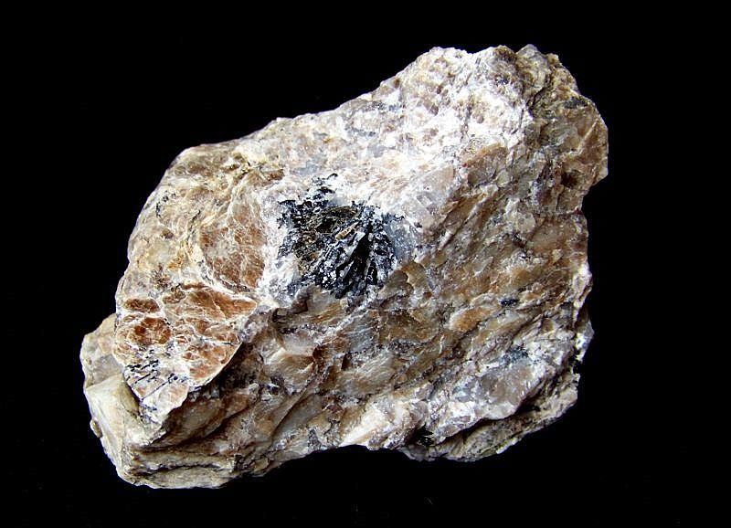 Pegmatyt hybrydalny (desilifikowany) z turmalinami i skaleniami. Szklary k. Ząbkowic Śląskich (kopalnia niklu "Marta"). Dolny Śląsk, Polska.